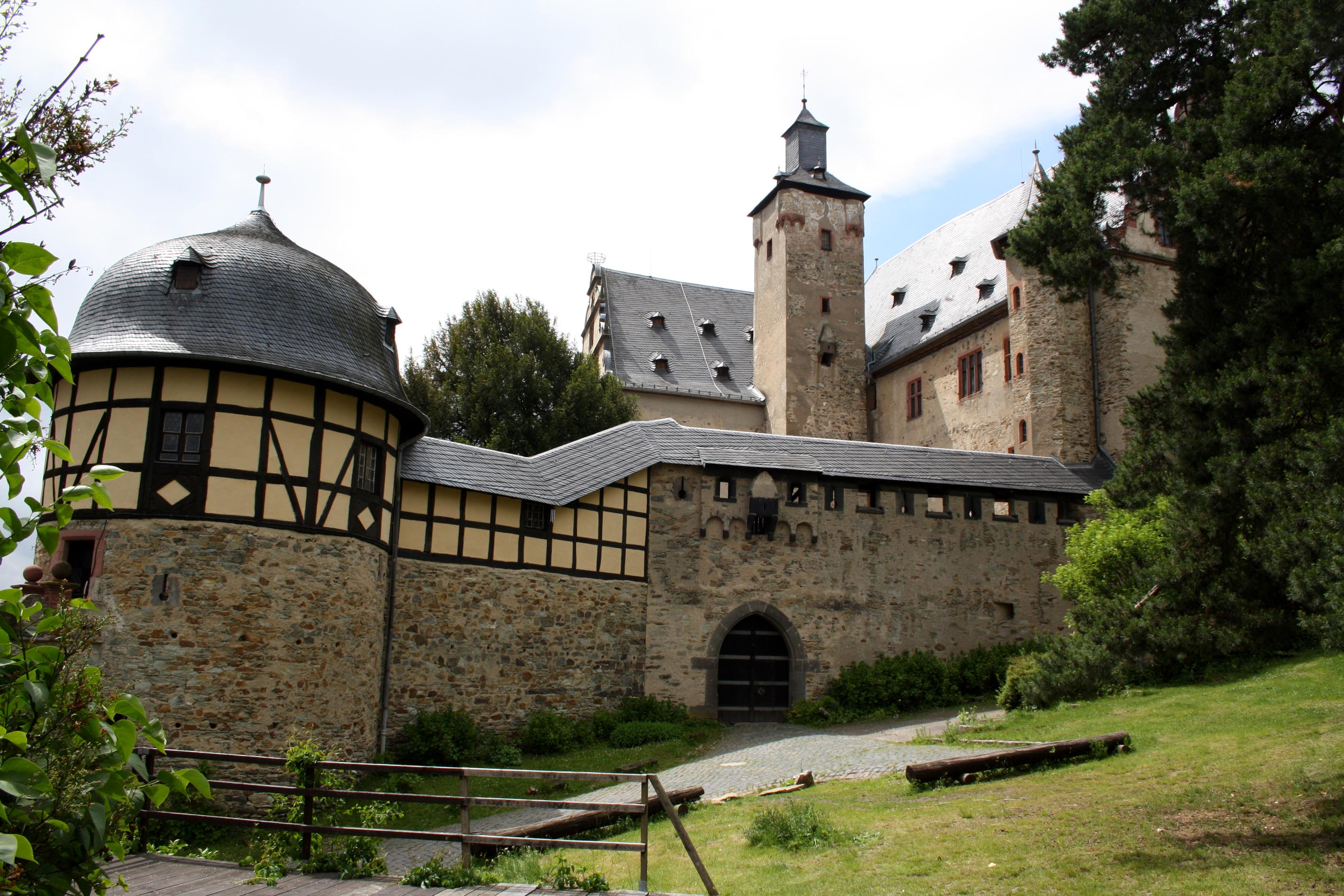 Burg Kronberg, Mittelburg